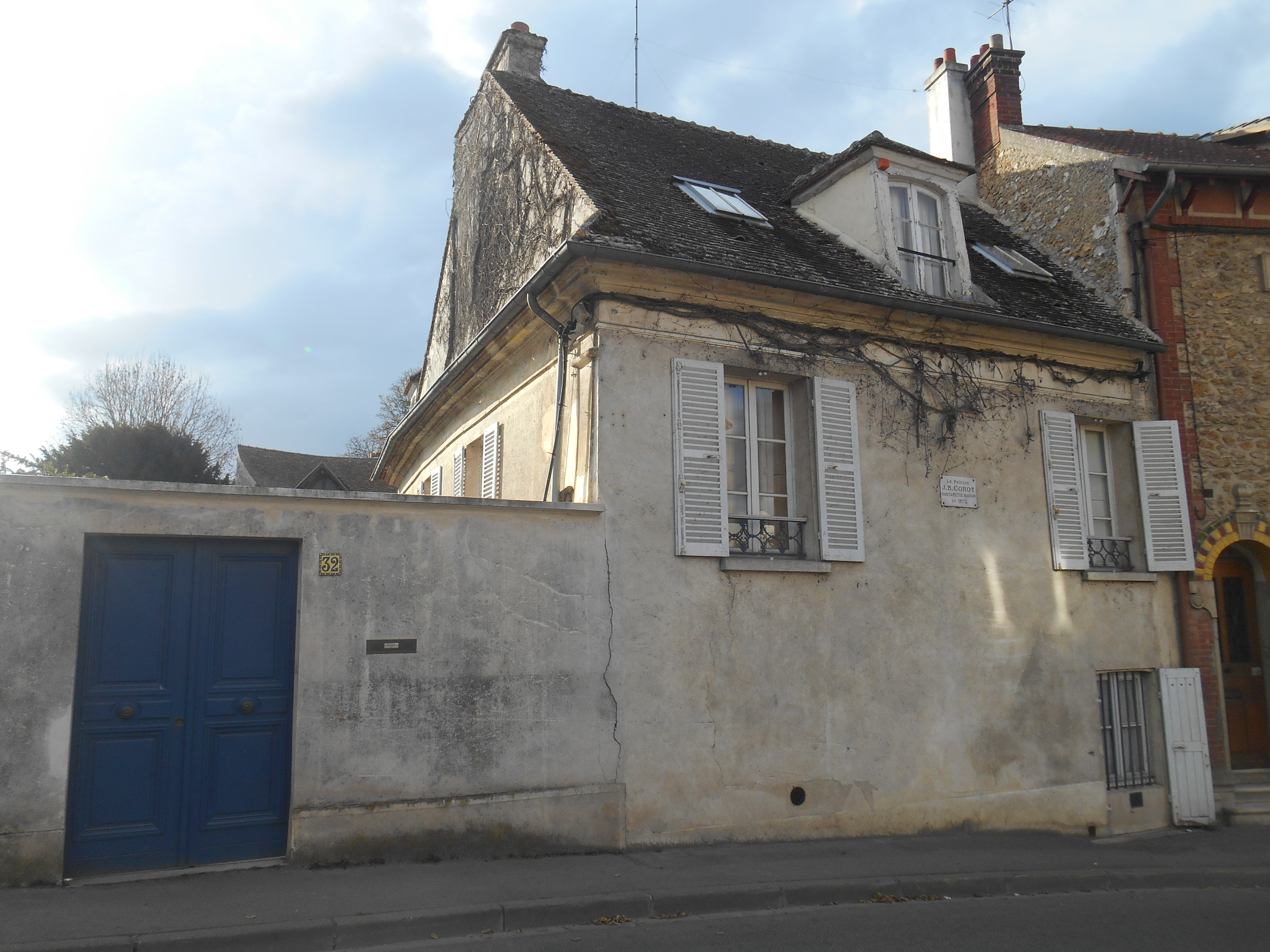 Maison de Corot, à Crécy-la-Chapelle (77)